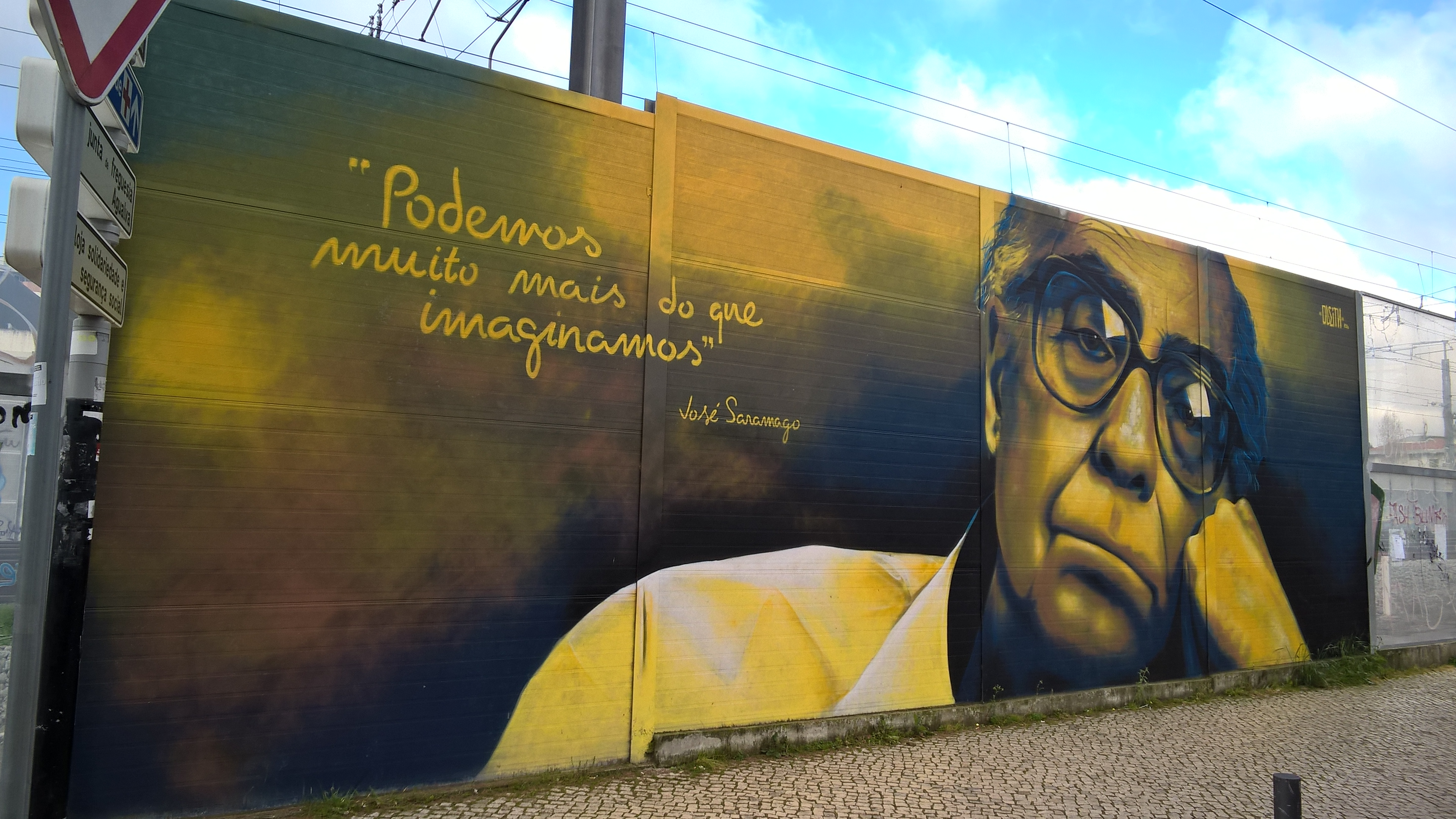 Saramago Grafitti Rua Afonso de Albuquerque